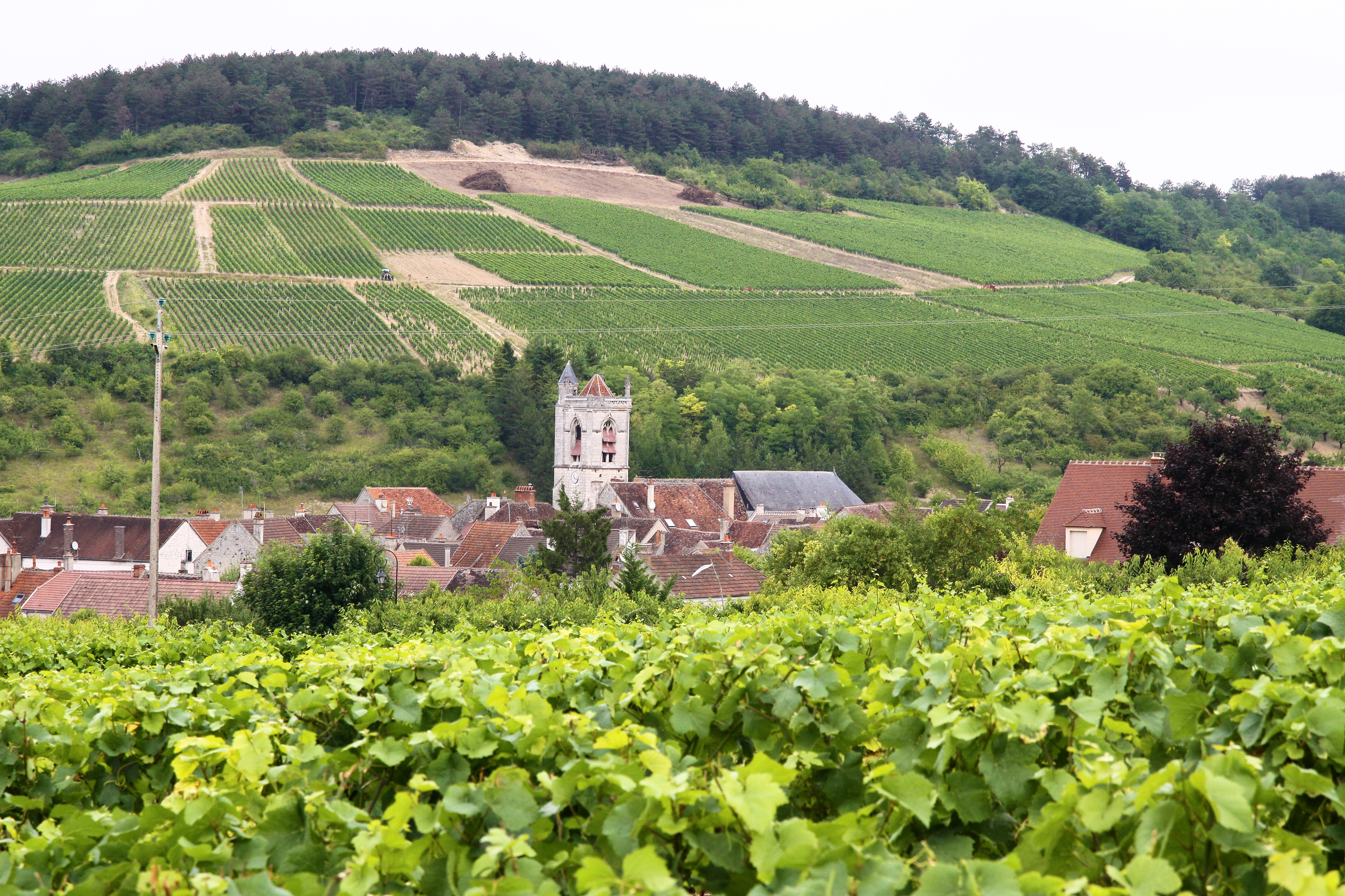 Irancy, vu depuis le versant Sud